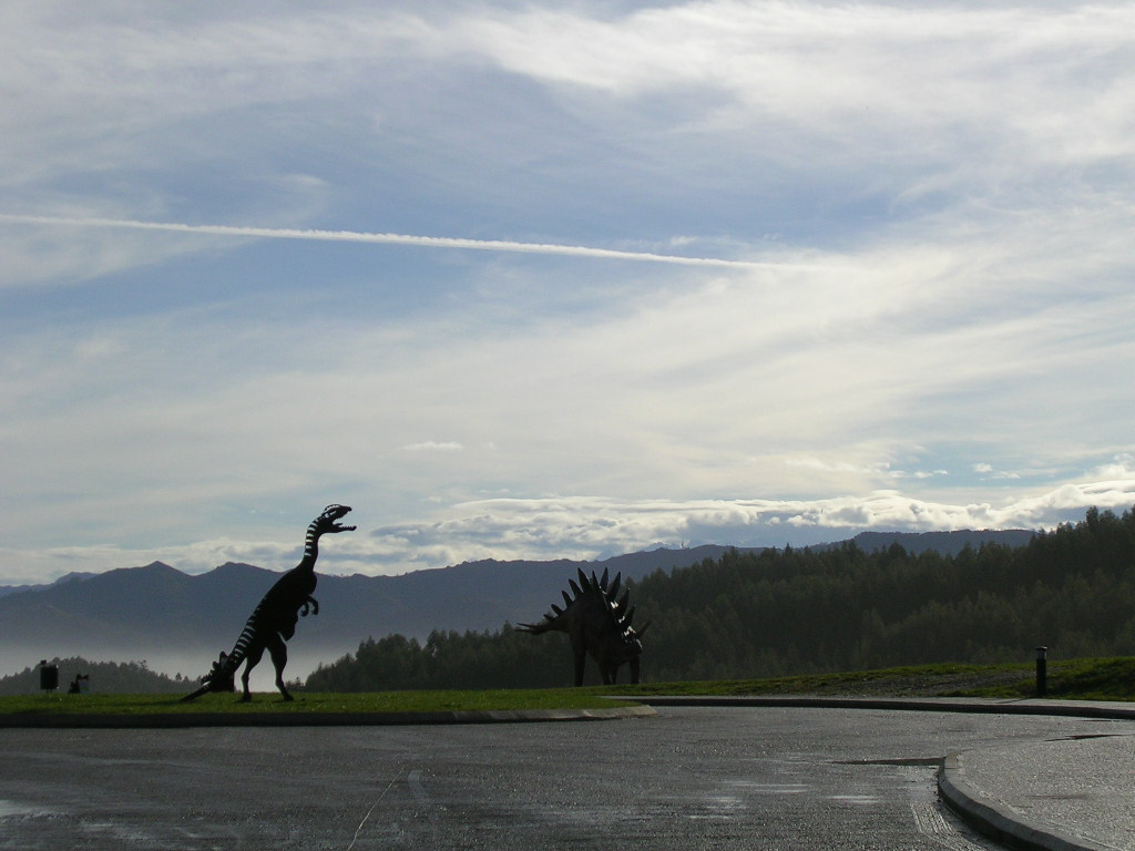 Museo del Jurásico de Asturias